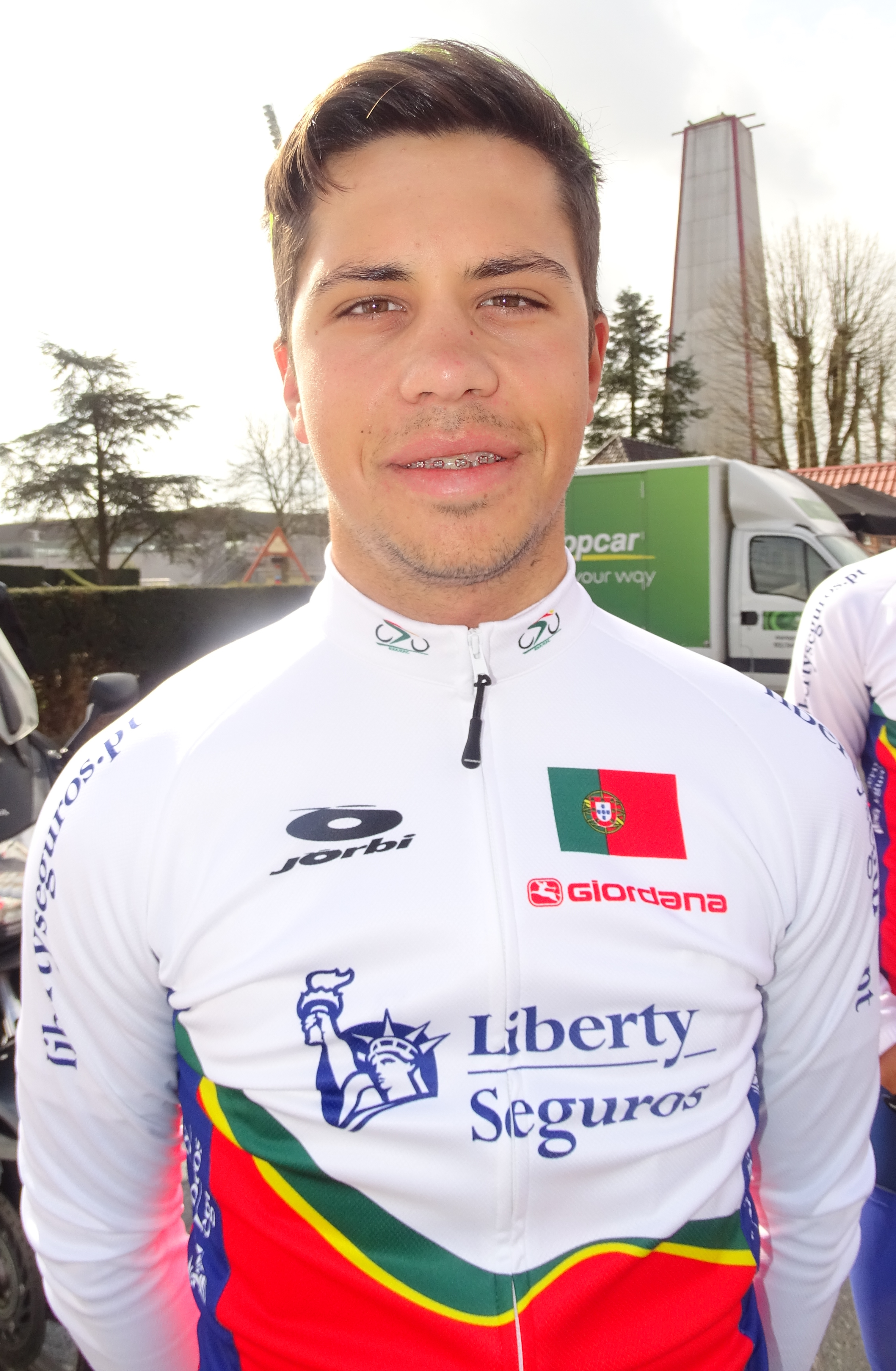 Reportage réalisé le samedi 11 avril à l'occasion du départ et de l'arrivée du Tour des Flandres espoirs 2015 à Audenarde, Belgique.